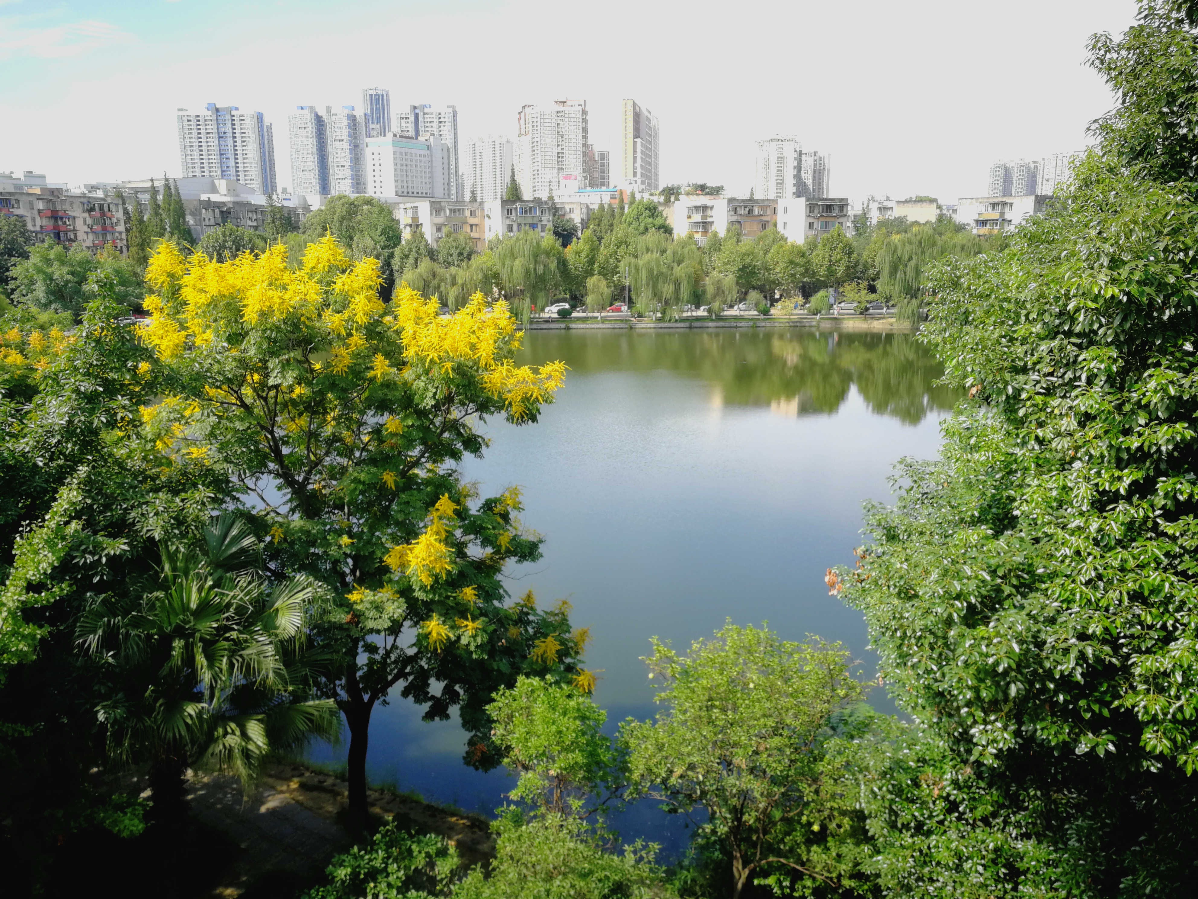 中文（中国大陆）: 西南交通大学九里校区镜湖